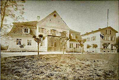 Schloss Neudorf bei Bentschen, Provinz Posen